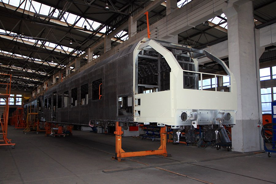 Pudło członu rozrządczego elektrycznego zespołu trakcyjnego Newag Impuls przed montażem czoła z laminatu w hali Newagu w Nowym Sączu.